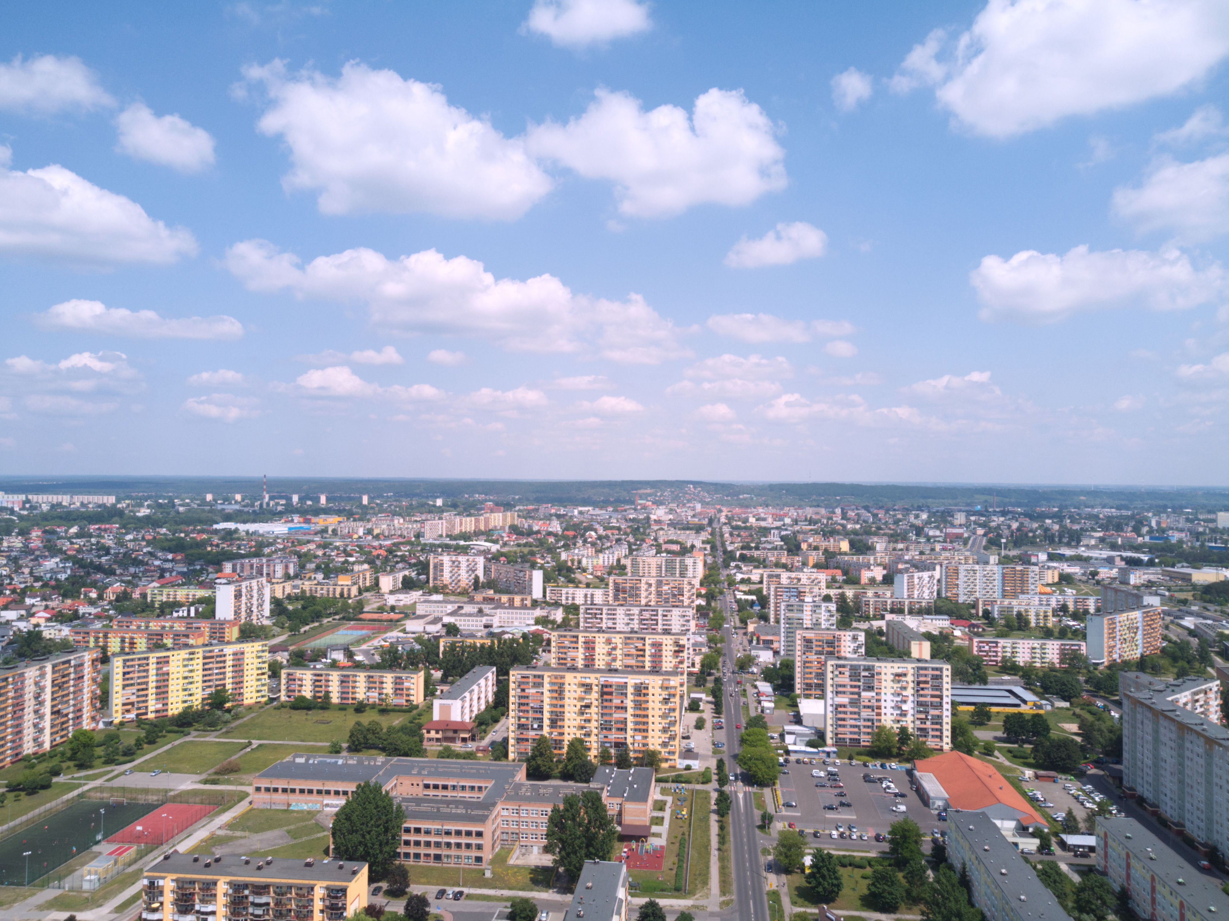 Dzielnica Południe z lotu ptaka (2020 r.)